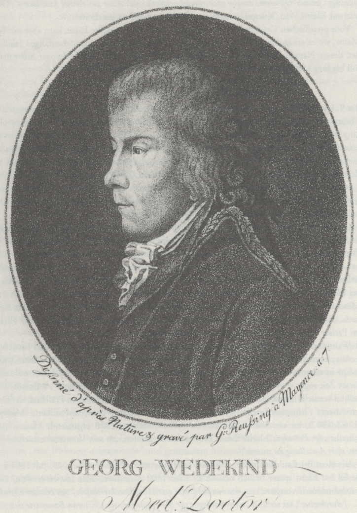 zeitgenössisches Bild des Arztes Dr. Georg von Wedekind (1761-1831)